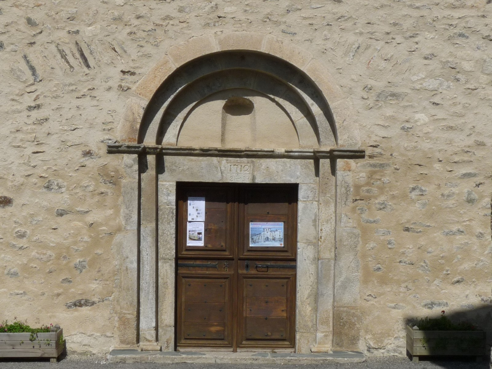 Eglise de Fontrabiouse, Pyrénées-Orientales, France